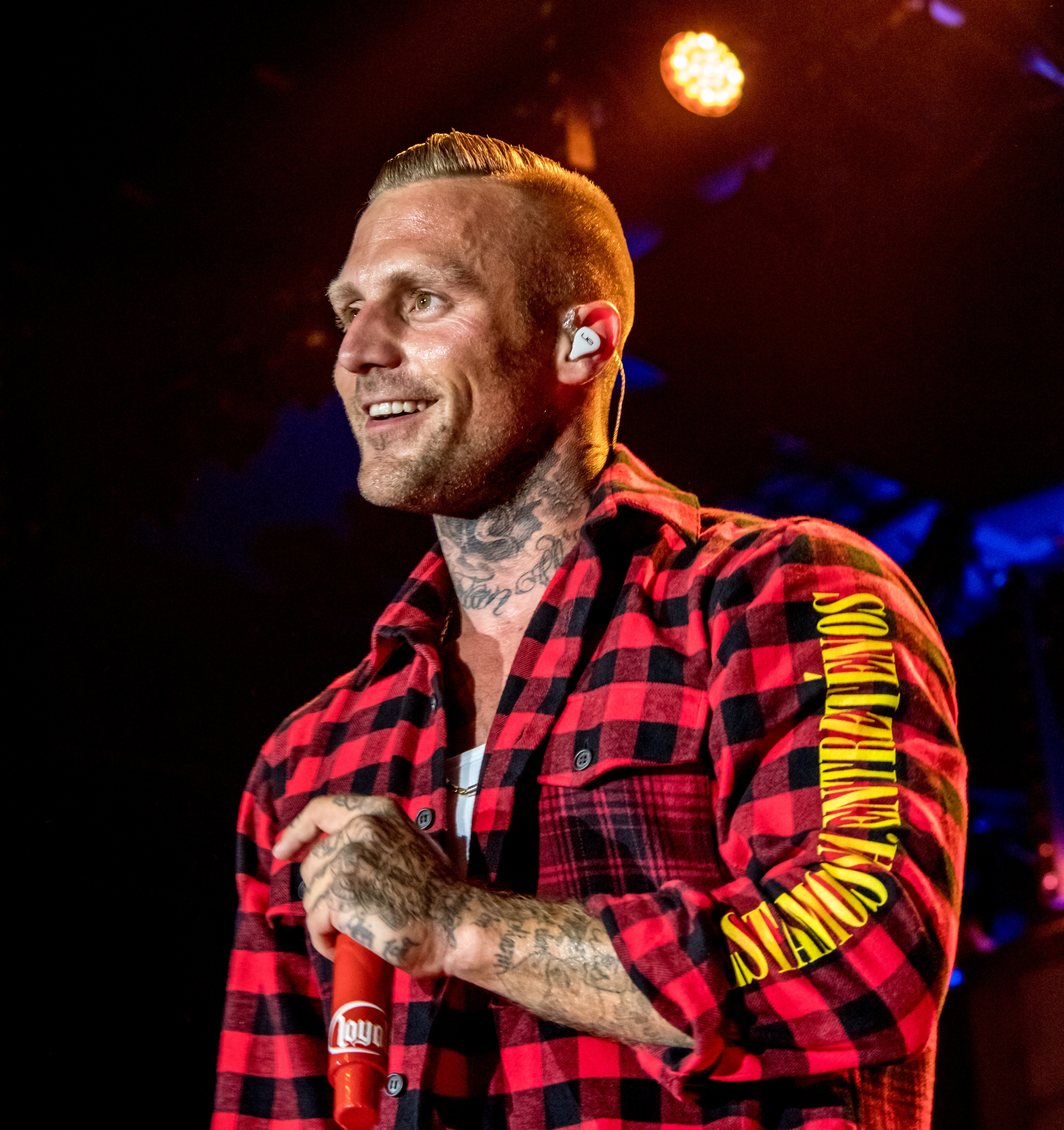 Bilder vom Zelt Musik Festival 2018 in Freiburg im Breisgau Kontra K am 27.07.2018 im Zirkuszelt